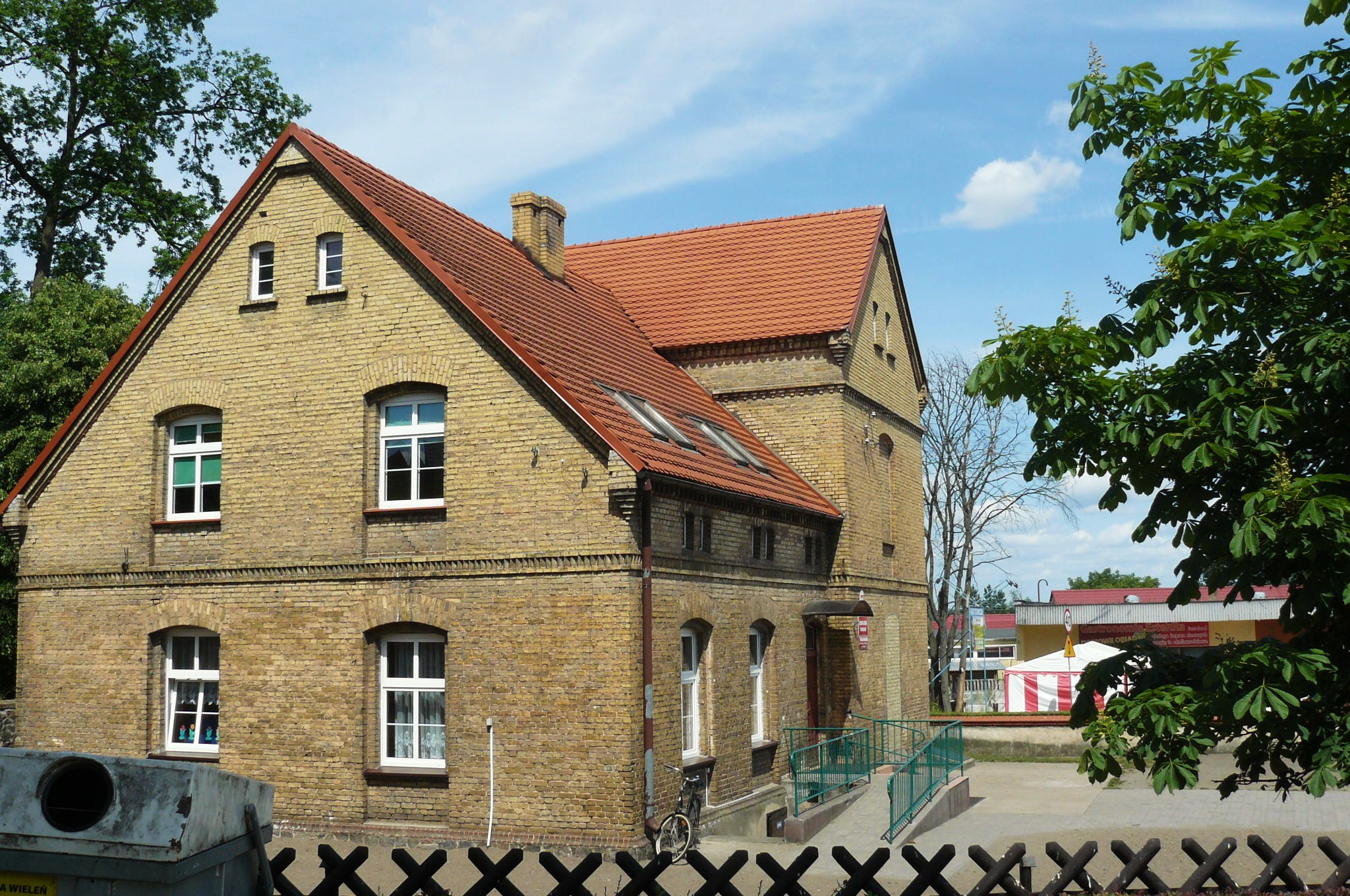 Rosko. Szkoła z pocz. XX w.